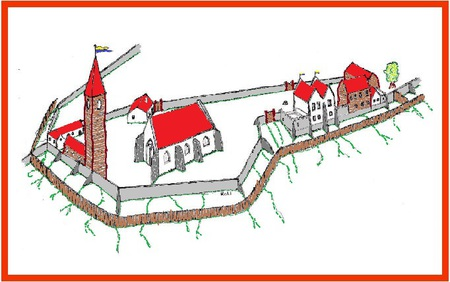 Rekonstrukční kresba Fryštátského hradu v Karviné na základě historického popisu a dochovaných staveb